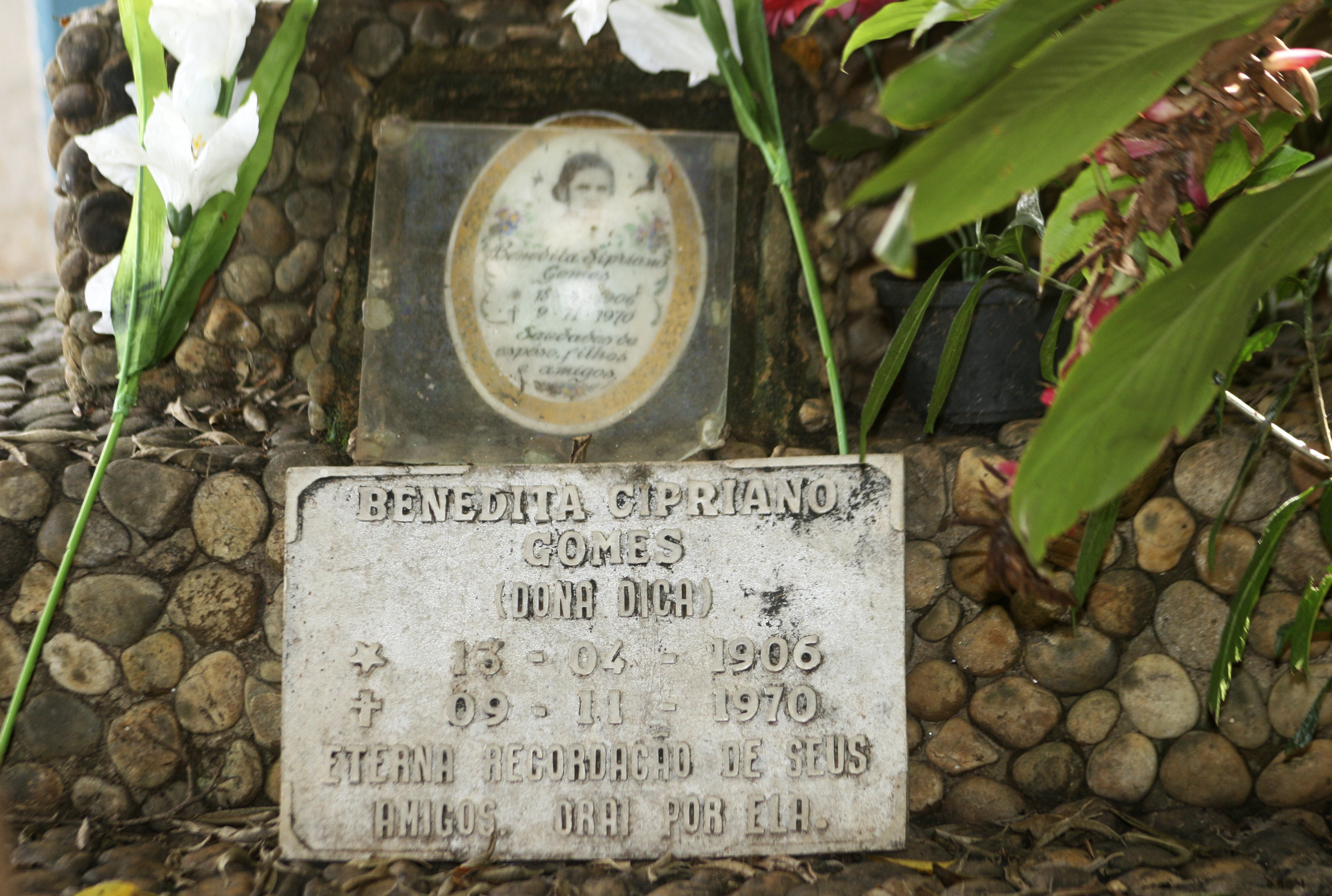 Túmulo de Santa Dica - Benedicta Cypriano Gomes